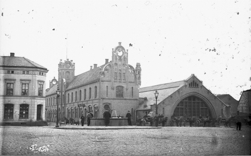 Jernbanegården i Christiania (Østbanen), hestekjøretøy, mennesker, fontene, bygård, Jernbanetorvet.